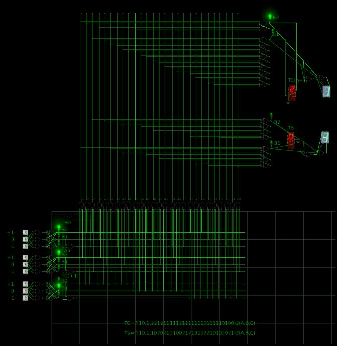 Снимок модели троичного тринарного (трёхоперандного, полного) сумматора-вычитателя в троичной симметричной системе счисления в двухбитной системе троичных логических элементов в логическом анализаторе Atanua.